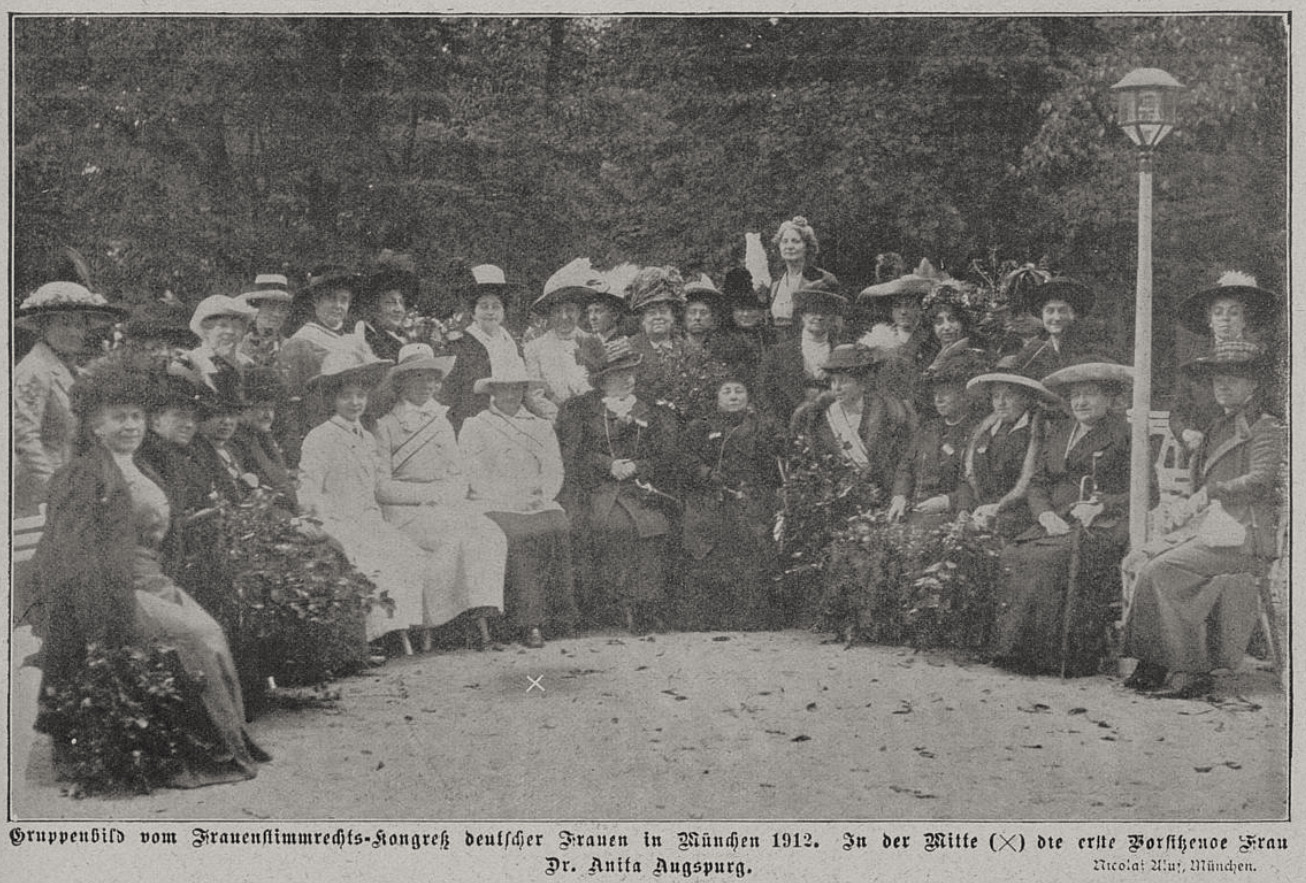 Gruppenbild vom Frauenstimmrechts-Kongress deutscher Frauen in München 1912. In der Mitte (X) die erste Vorsitzende Frau Dr. Anita Augspurg. Foto Nicolas Alus, München